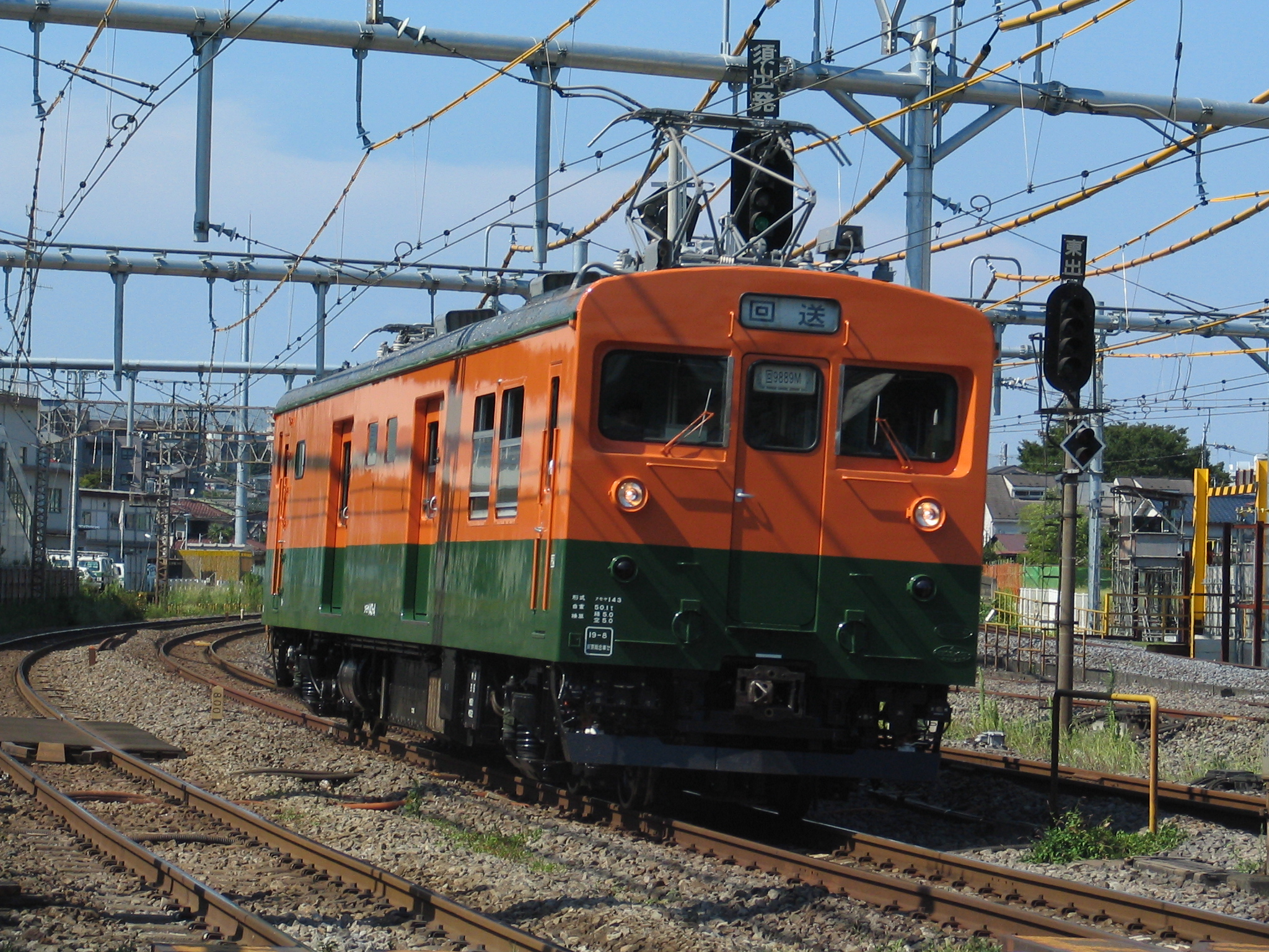 クモヤ143-4 TYPE-KUMOYA143